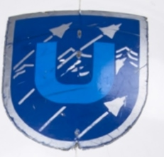 Divisionsmärke för Urban Blå eller 212 stridsflygdivisionen i svenska flygvapnet.